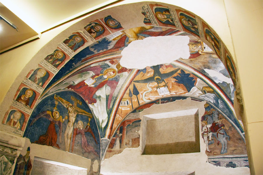 Novara - Basilica di San Gaudenzio, cappella di San Giorgio